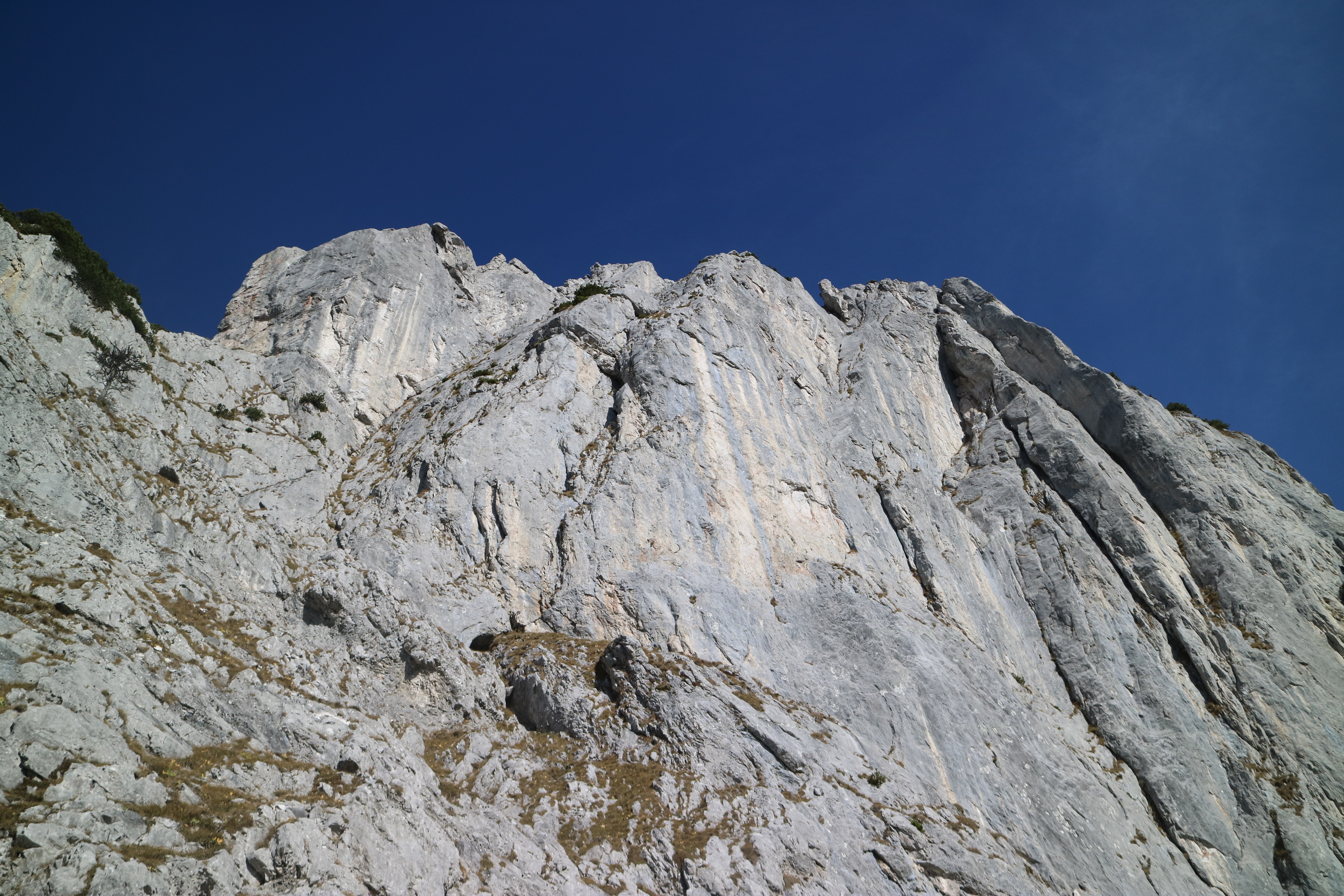 Südwand des Großen Festlbeilsteins, Hochschwab (Steiermark)